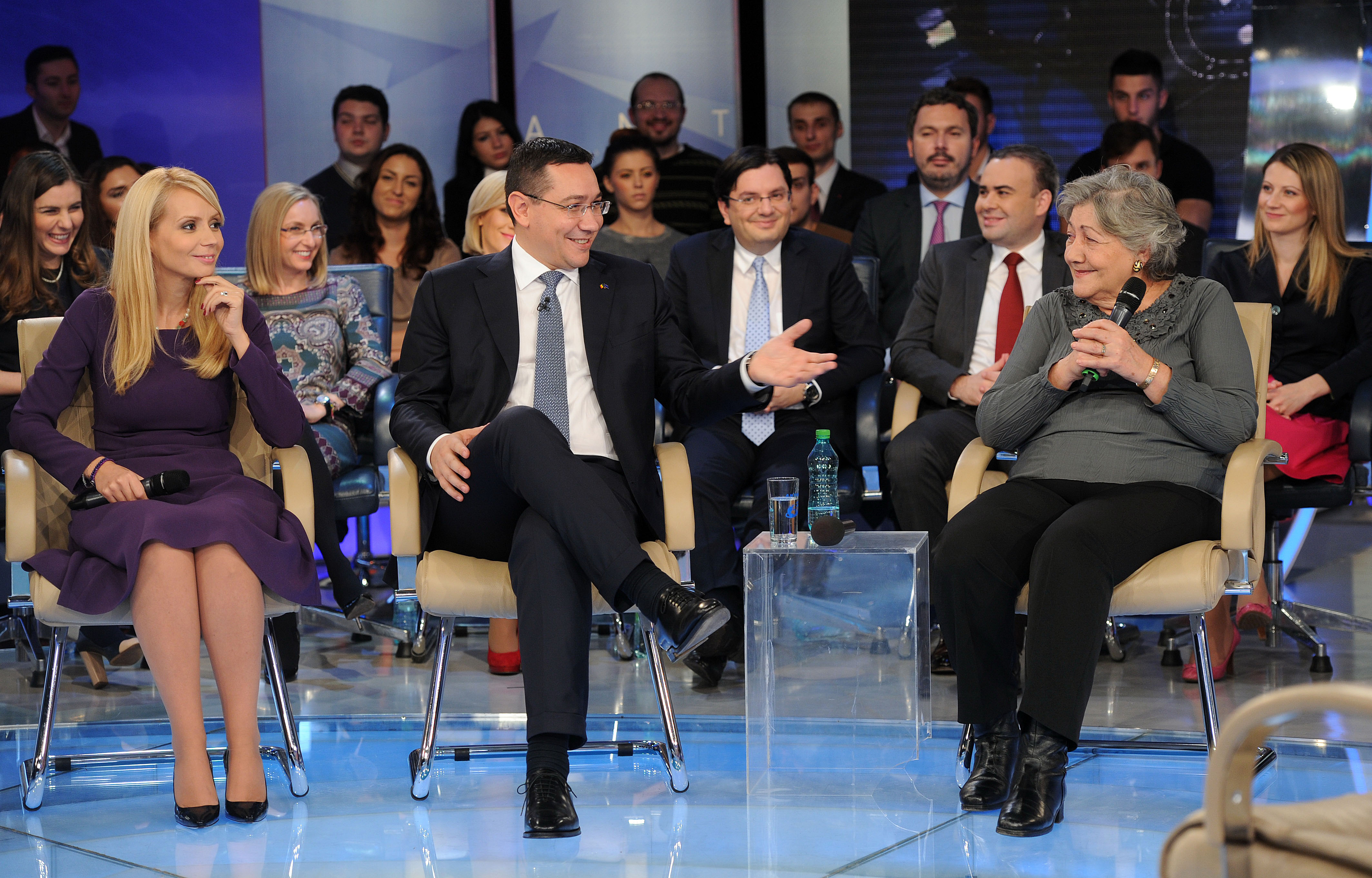 Victor Ponta la dezbaterea de la Antena 3 - 13.11 (12)